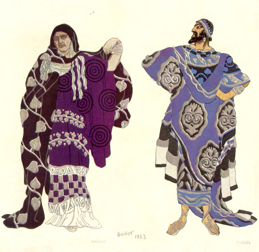 Эскизы костюмов Федры и Тезея для трагедии «Федра», театр «Ренессанс», Париж 1923